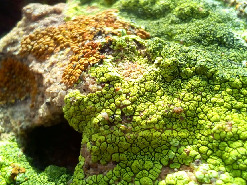 Liquenes Crustaceos en localidad de Paso Cordova-General Roca, Río Negro, Argentina.